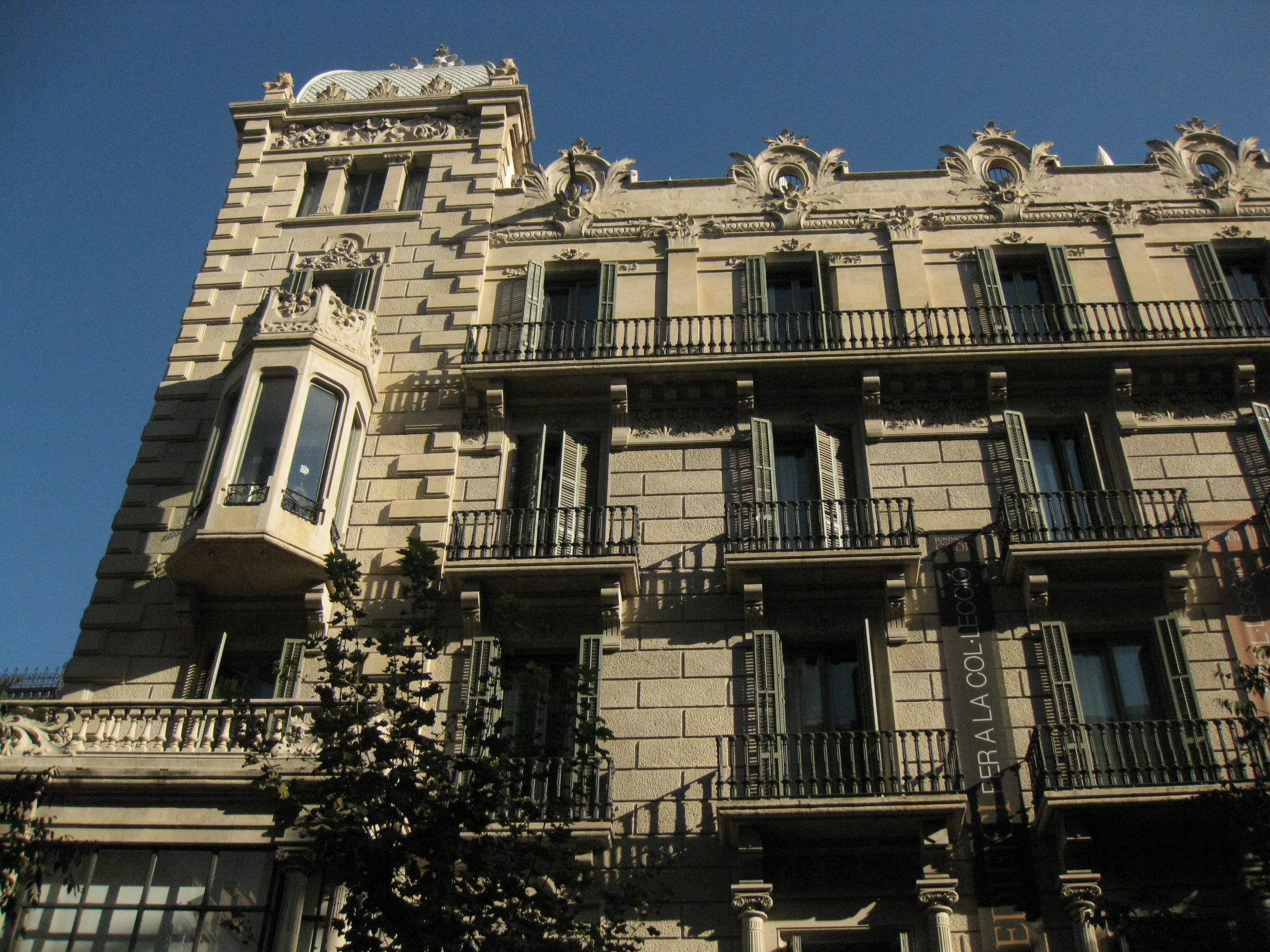 Casa Garriga Nogués (Enric Sagnier, 1899-1901), al carrer de la Diputació núm. 250, a l'Eixample de Barcelona. És la seu de la Fundació Francisco Godia.